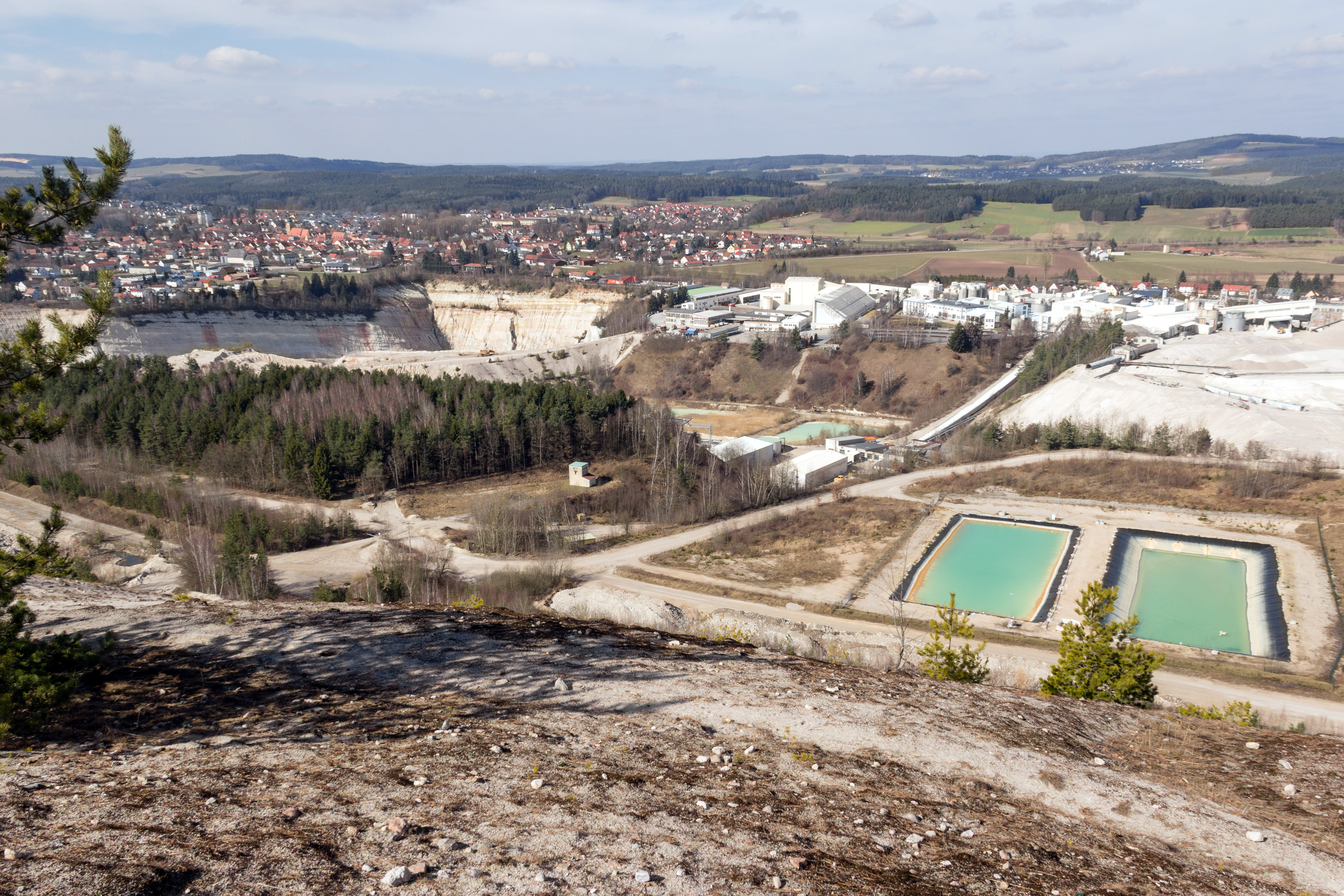 Kaolingruben bei Hirschau-Schnaittenbach, Geotop)